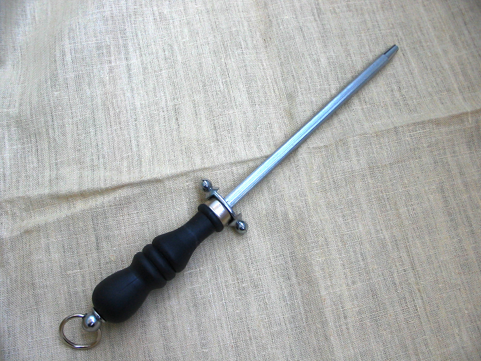 Мусат